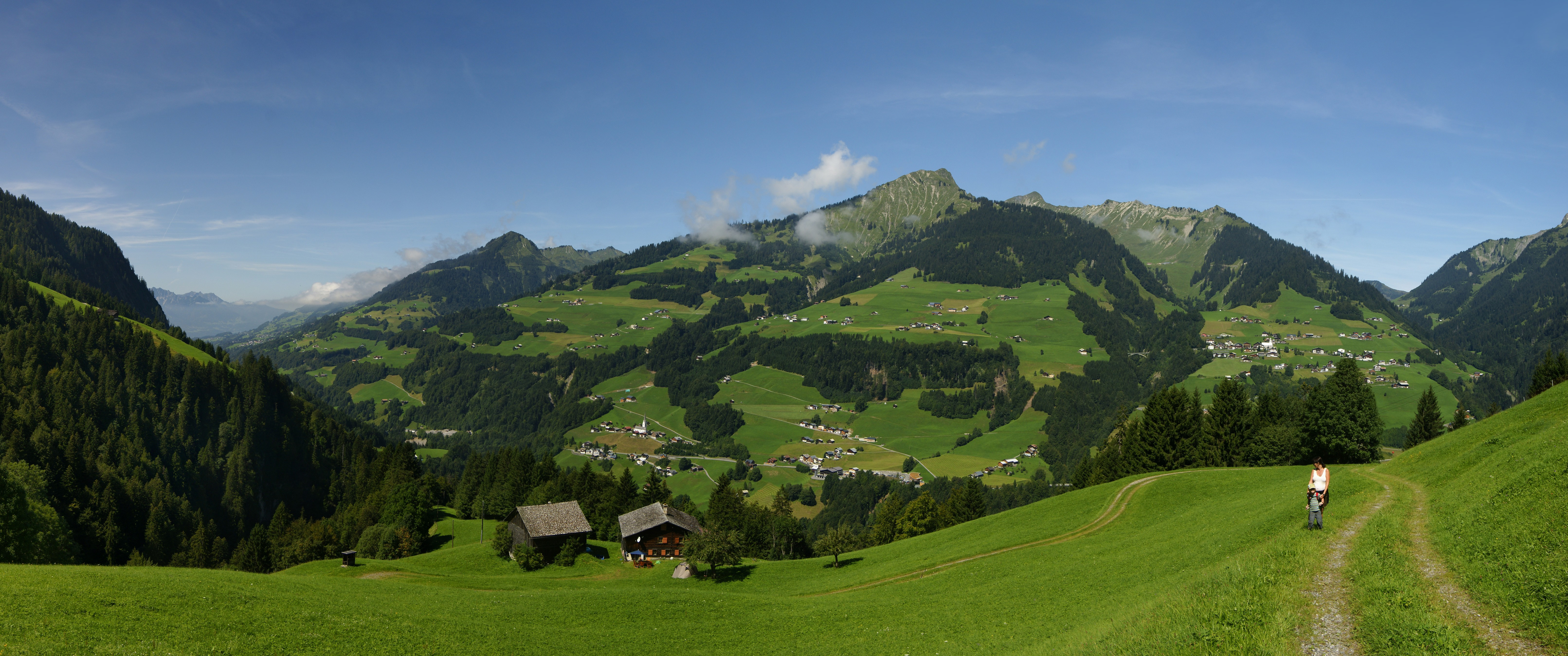 Blick über den Ortsteil Sein hinüber auf Sonntag und Fontanella. Darüber liegt das Sonnenköpfle 1.877m, links davon das Glatthorn 2.134m und weiter links das Türtschhorn mit 2.096m. Sie gehören zum Bregenzerwaldgebirge.